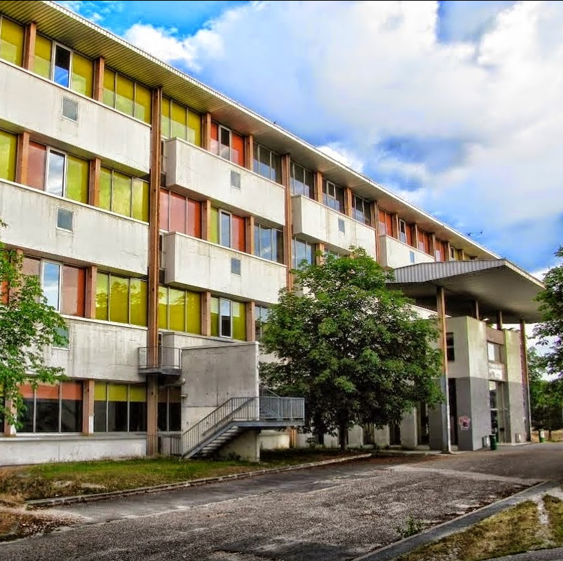 Façade de la BU Droit-Lettres, dessinée par Louis Sainsaulieu